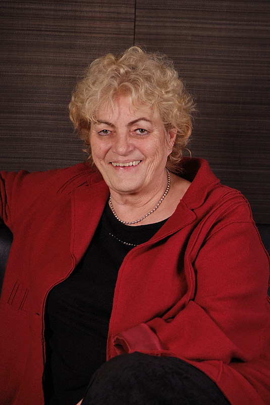 Karin Stief-Kreihe, Landtagsabgeordnete Niedersachsen, 16. Wahlperiode (Fotoprojekt Landtagsabgeordnete Niedersachsen am 24. und 25. November 2009)